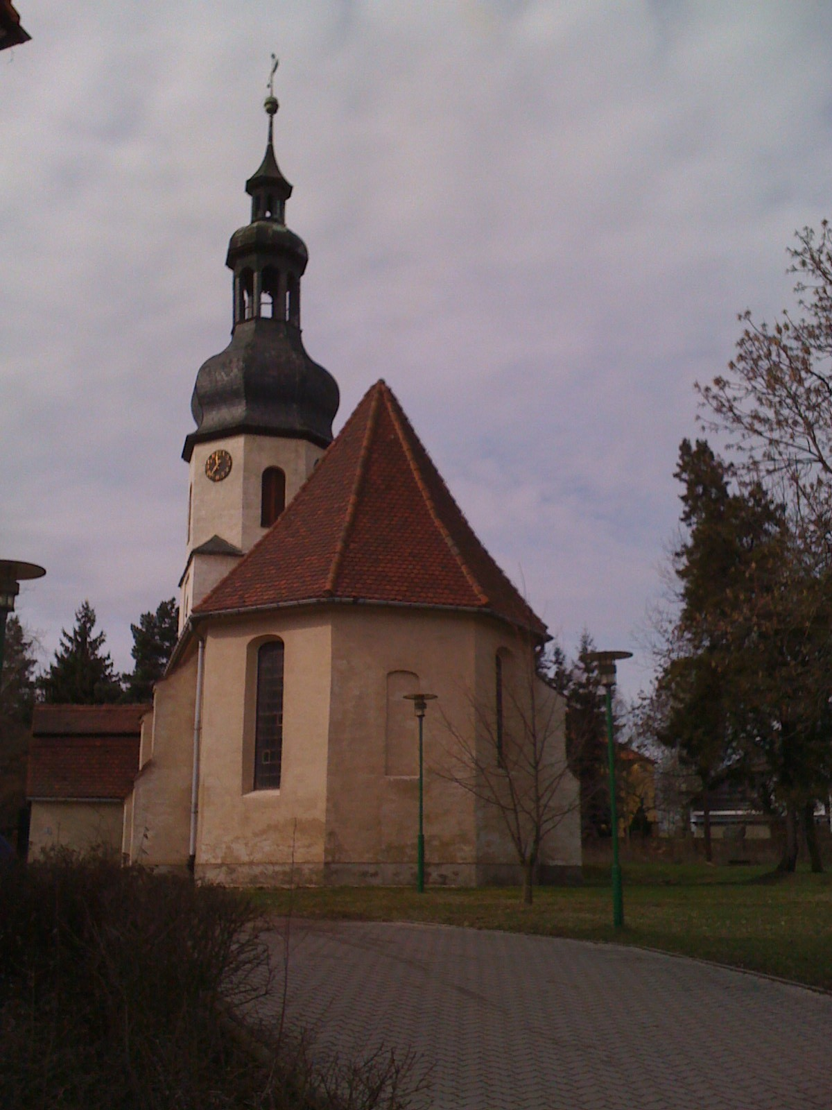 Kirche St. Elisabeth in Halle (Saale), Ortsteil Beesen